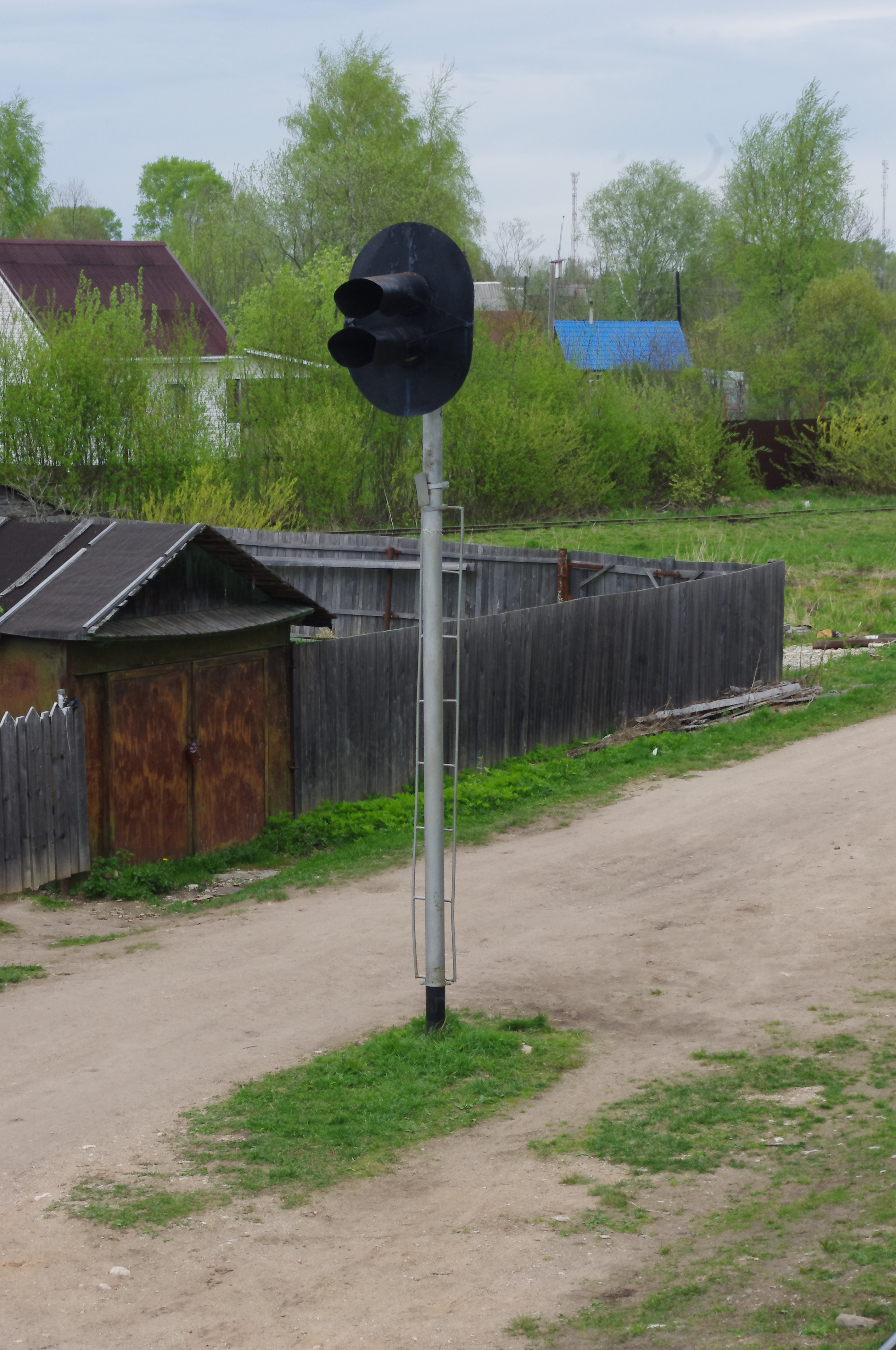 Входной светофор Тёсовской УЖД по главному пути.